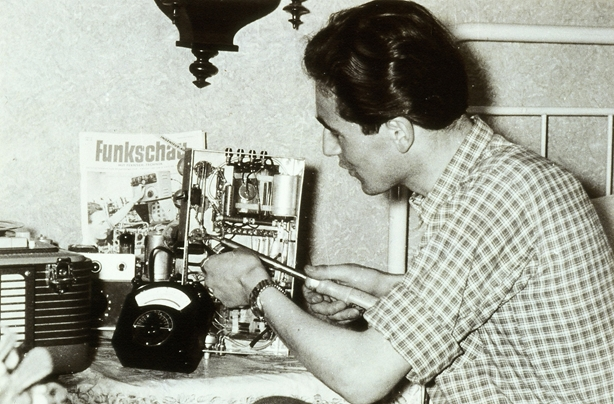 Pioniersarbeit - Walter Herrmann entwickelt seinen ersten Generator